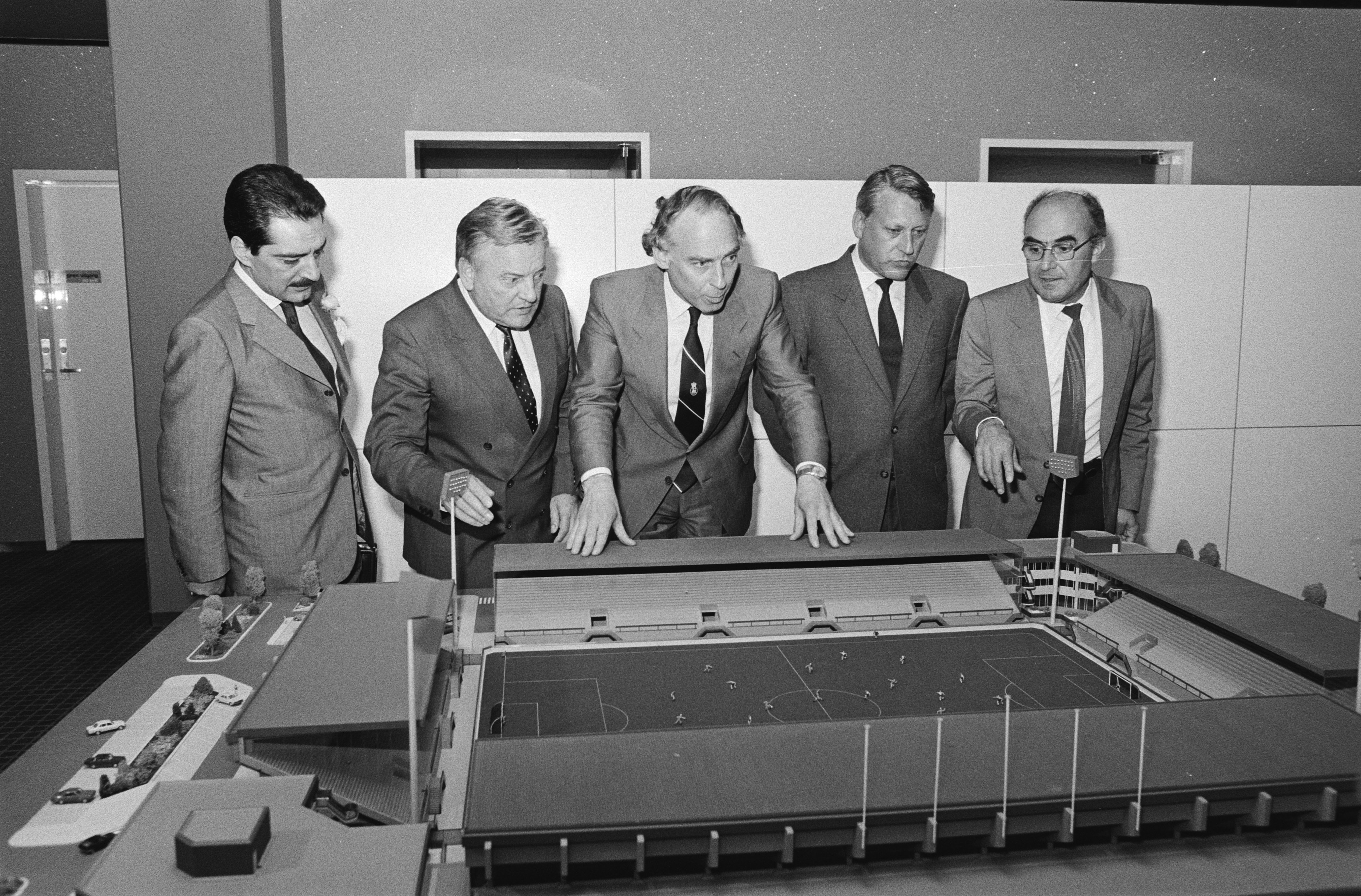 Collectie / Archief : Fotocollectie Anefo Reportage / Serie : [ onbekend ] Beschrijving : Overleg Europese sportministers over voetbaldrama in Brussel vlnr Van der Reijden, McFarlane en A. Calmat (Fr.) bij maquette van stadion Utrecht Datum : 11 juni 1985 Trefwoorden : OVERLEG, maquettes, ministers, stadions Persoonsnaam : Calmat, A., Reijden, Joop van der Fotograaf : Vollebregt, Sjakkelien / Anefo Auteursrechthebbende : Nationaal Archief Materiaalsoort : Negatief (zwart/wit) Nummer archiefinventaris : bekijk toegang 2.24.01.05 Bestanddeelnummer : 933-3494